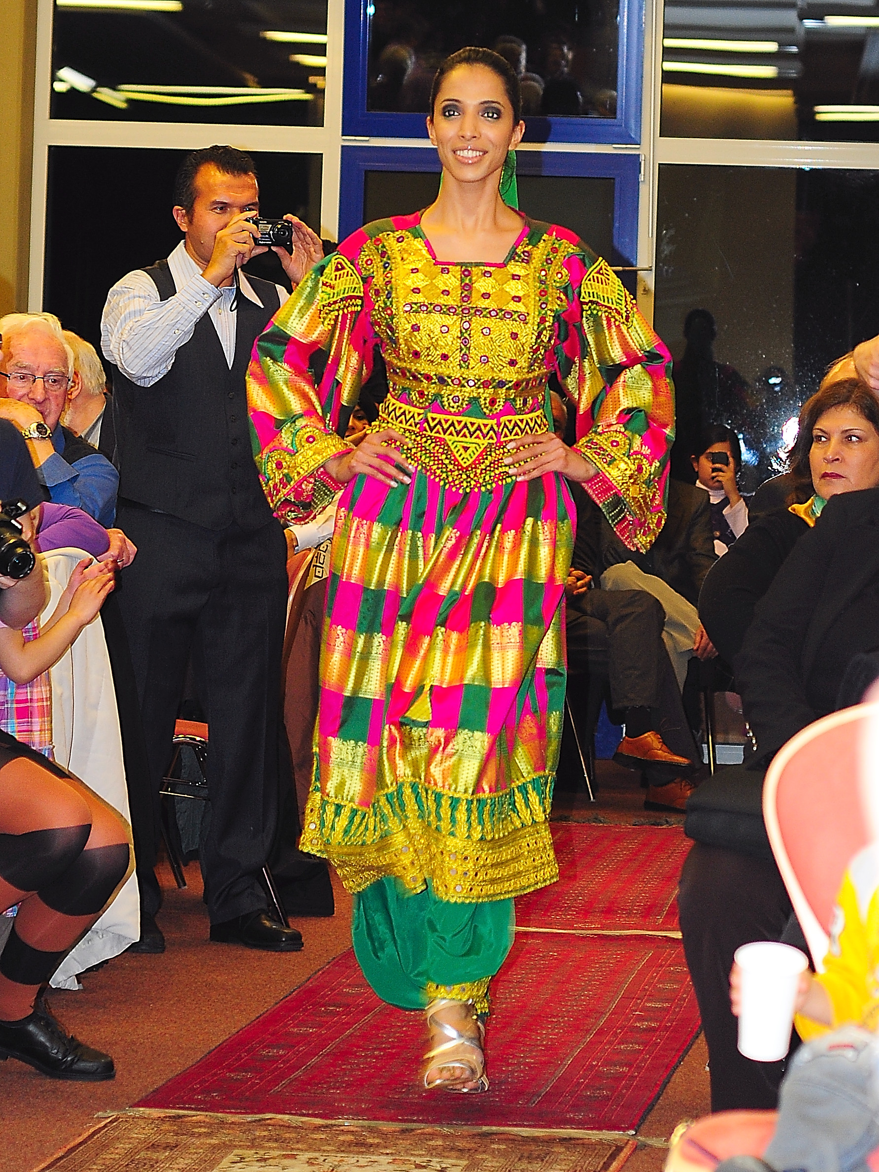 Topmodel Zohre Esmaeli at a charity fashion show in Bad Kreuznach on 5.11.2011. Topmodel Zohre Esmaeli präsentiert afghanische Mode während der "Afghanischen Nacht" in Bad Kreuznach auf Einladung des Vereins "Afghanistan - Hilfe, die ankommt".